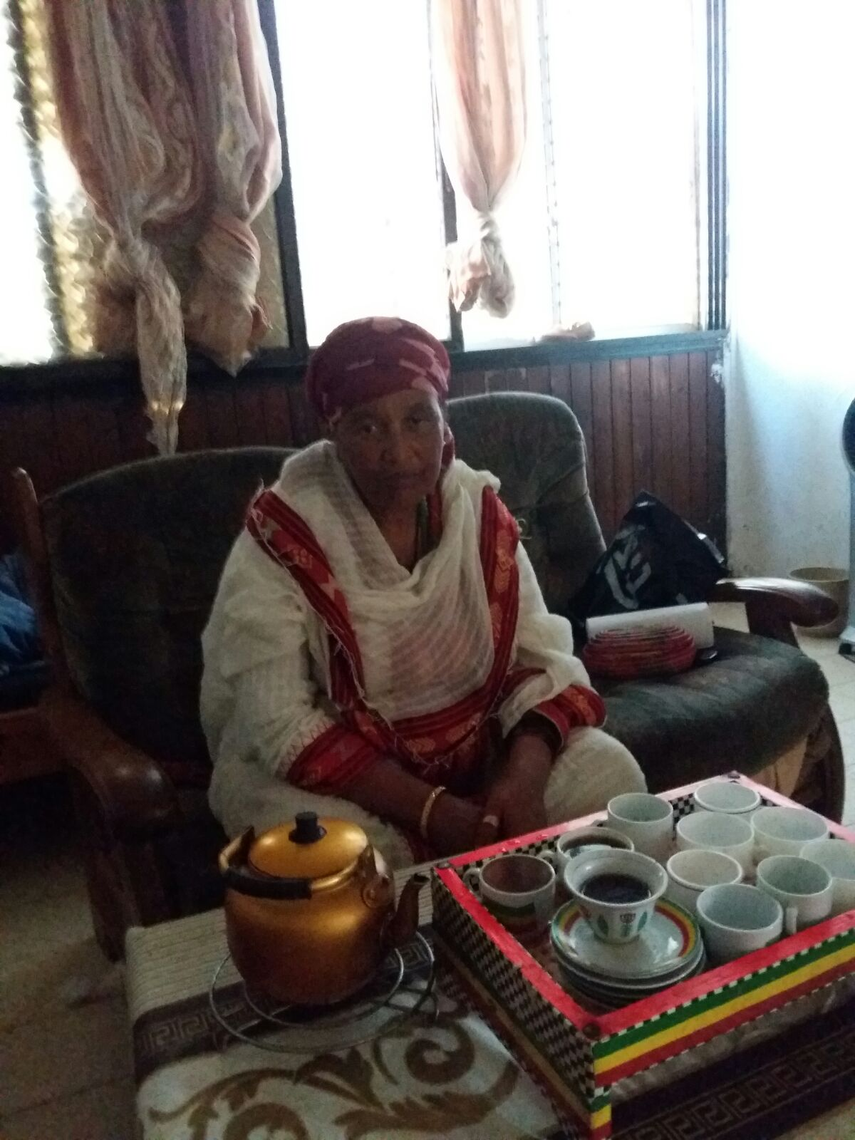 .גדלה בכפר אטגה שבאתיופיה ועלתה לארץ ישראל.